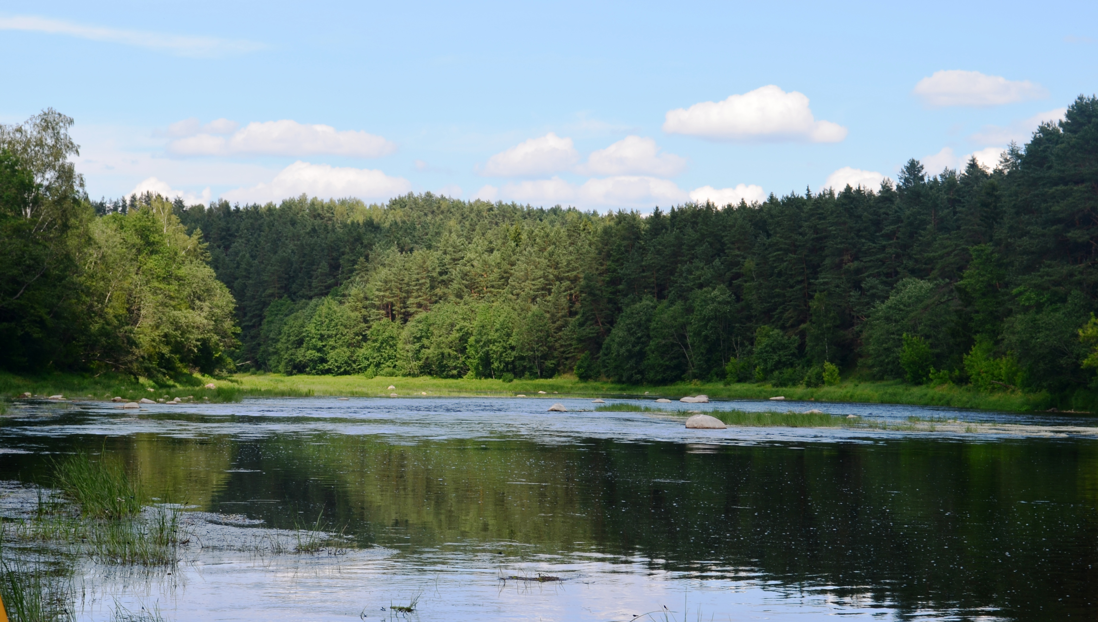 Grabijolų rėva Neryje, Vilniaus raj./Elektrėnų sav.